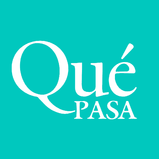 Logotipo de la revista digital "Qué Pasa" desde octubre de 2018.